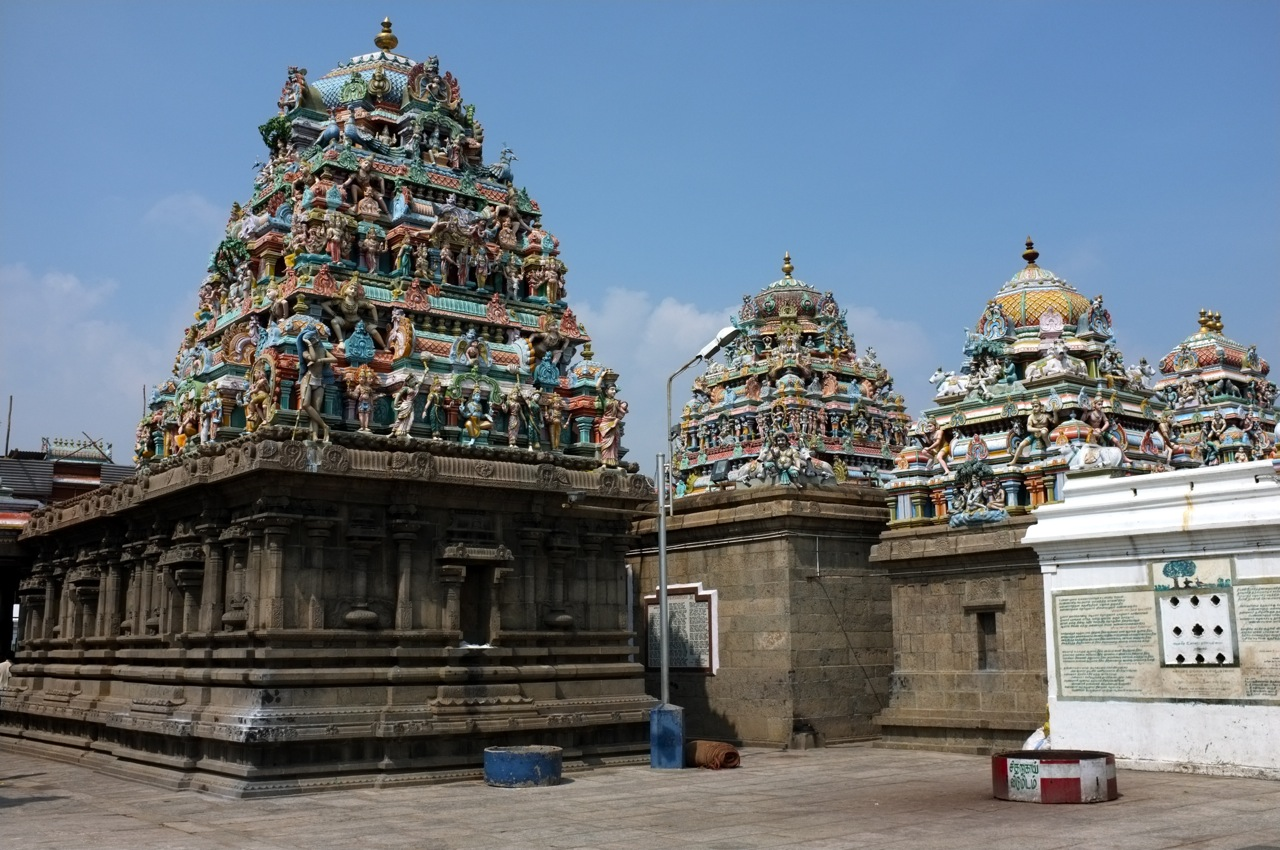 Kapaleeswarar Temple